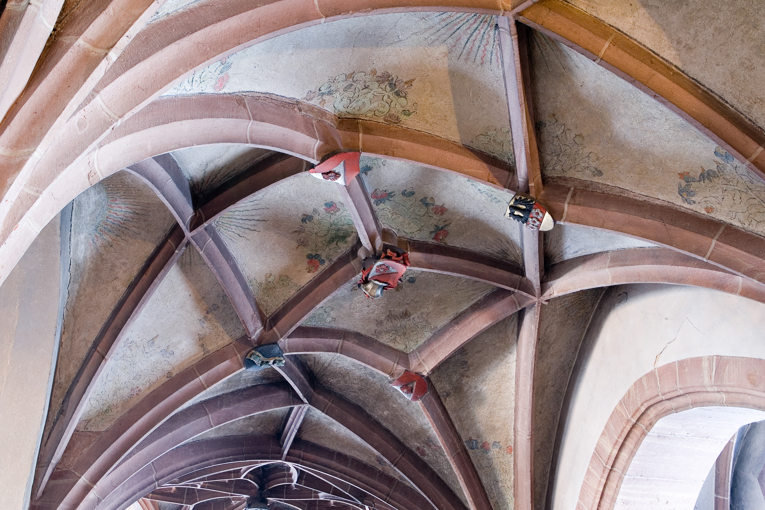 Sterngewölbe, hier u. a. mit Wappen der Frankfurter Familie Frosch und Holzhausen, im mittleren nördlichen Seitenschiff (westliche Hälfte) der Leonhardskirche in Frankfurt am Main. Selber fotografiert im März 2008, Doppellizensierung GFDL & CC-BY-SA 2.5.